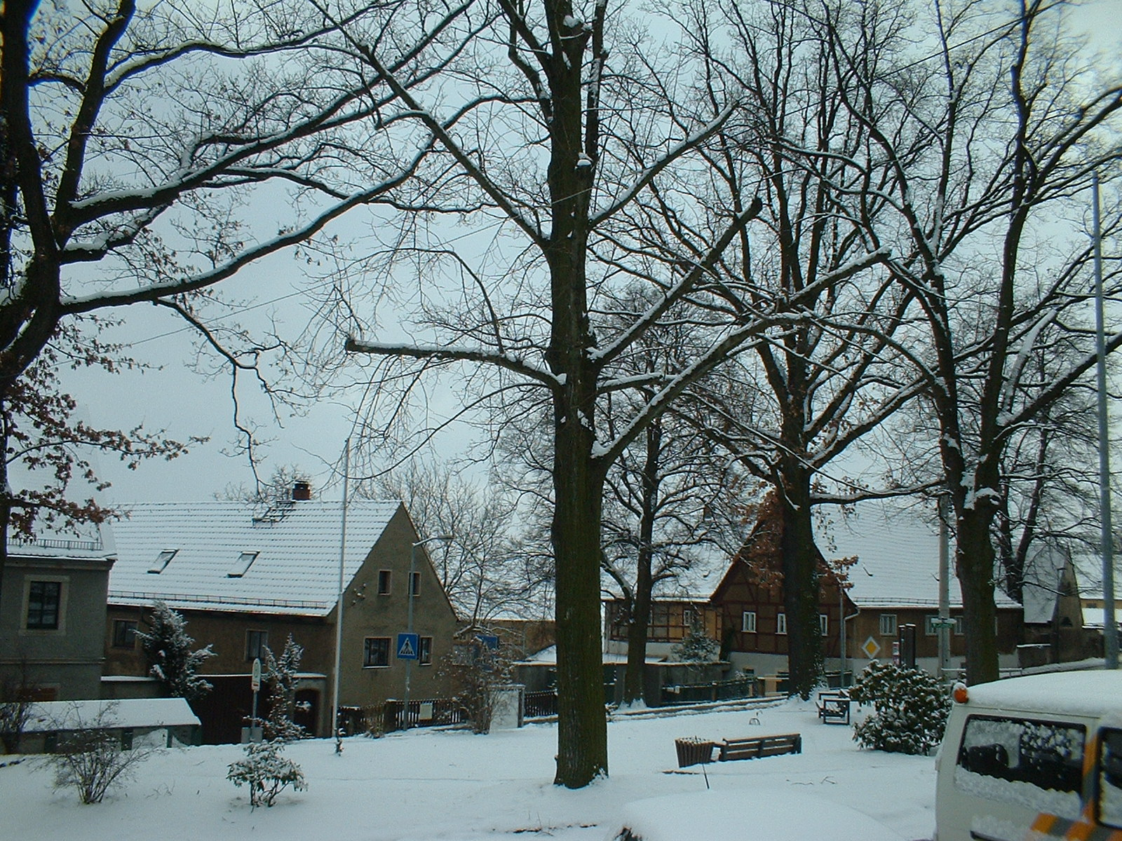 Rippien im Winter